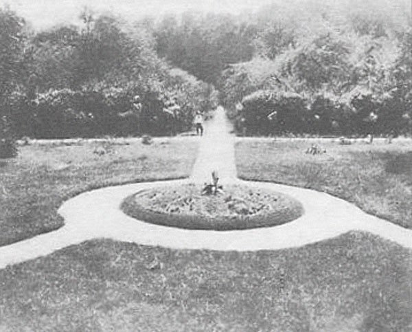 Беларуская (тарашкевіца): Валожын (Vałožyn), палац Тышкевічаў (Tyškievič). Аранжарэя